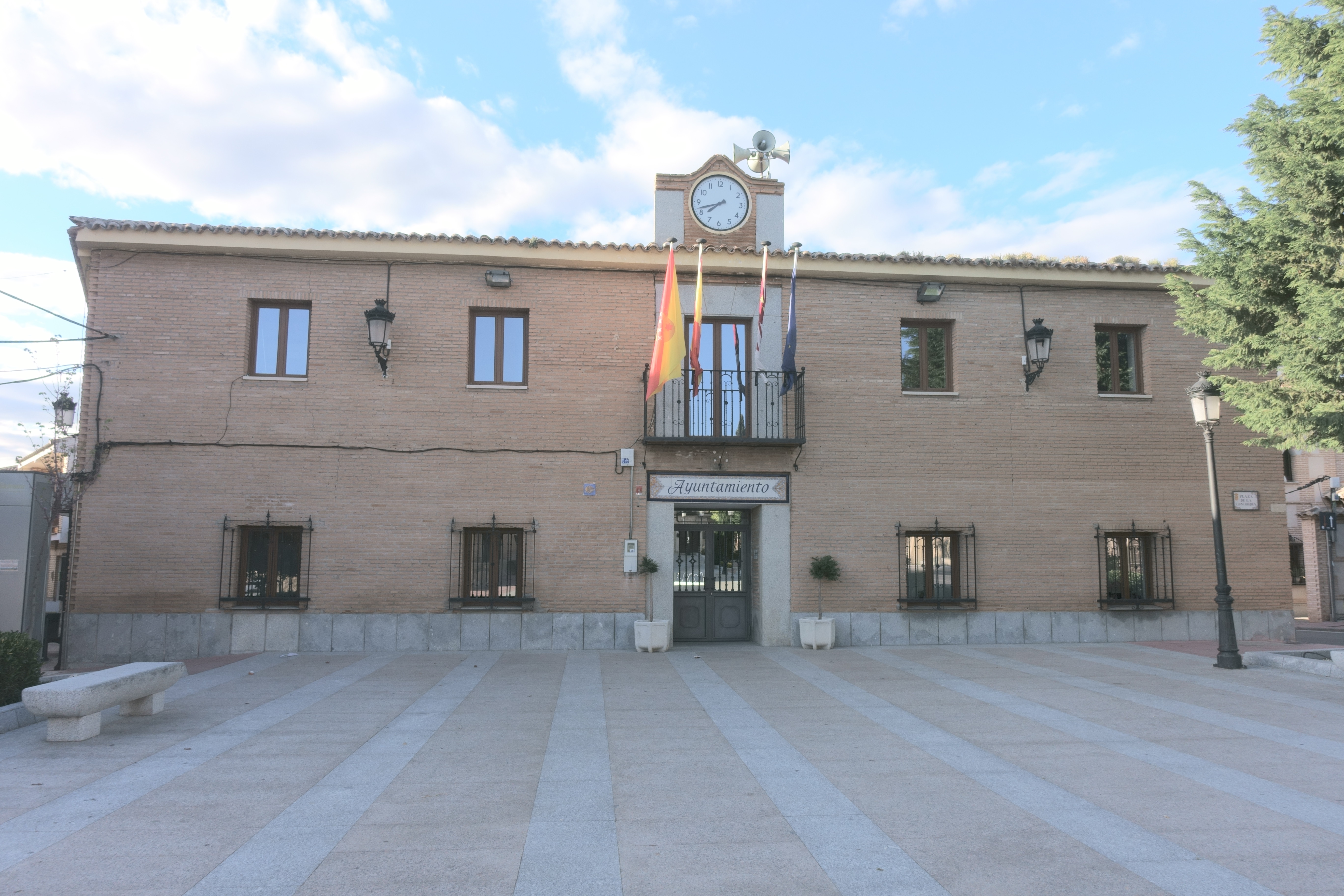 Casa consistorial de Cobisa (Toledo, España).